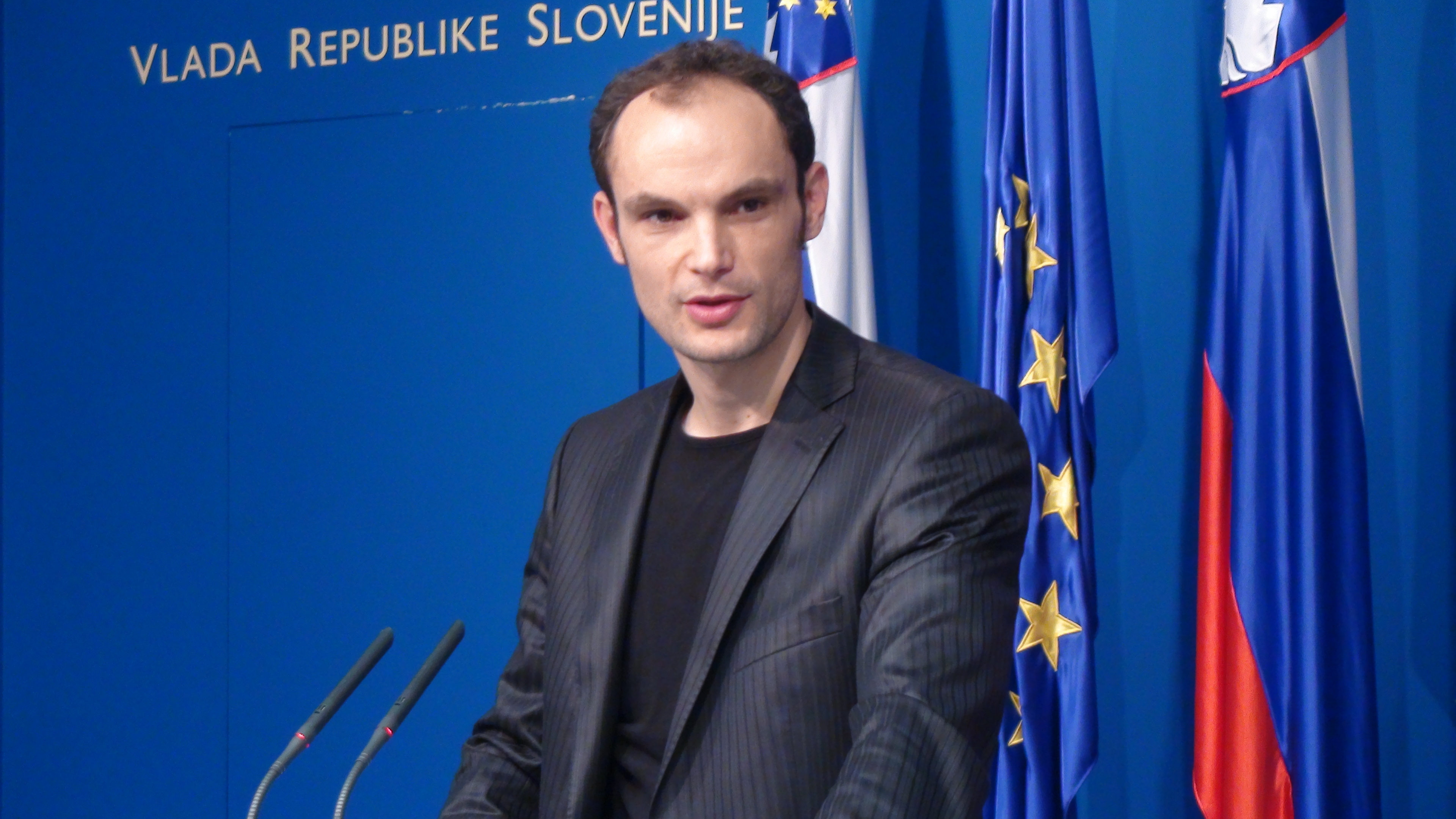 Na novinarski konferenci po seji vlade je sodeloval minister za finance Janez Šušteršič.